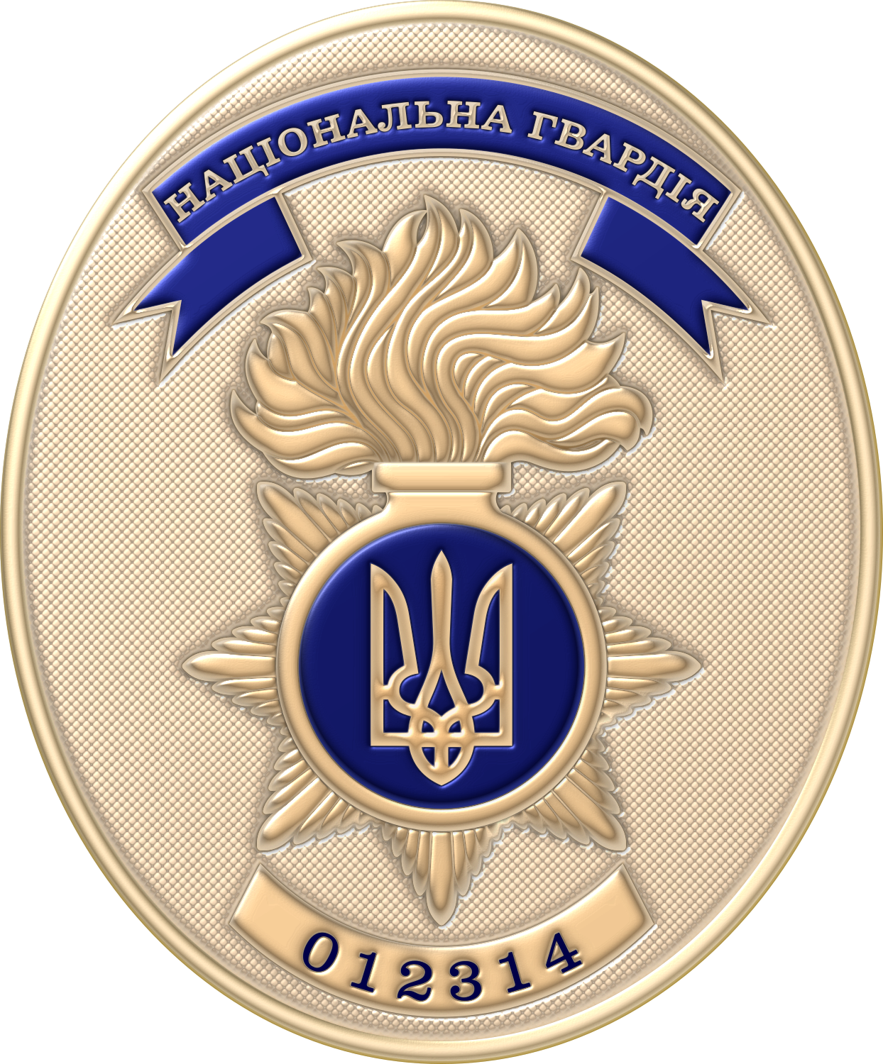 Нагрудний знак з особистим номером нацгвардійця.